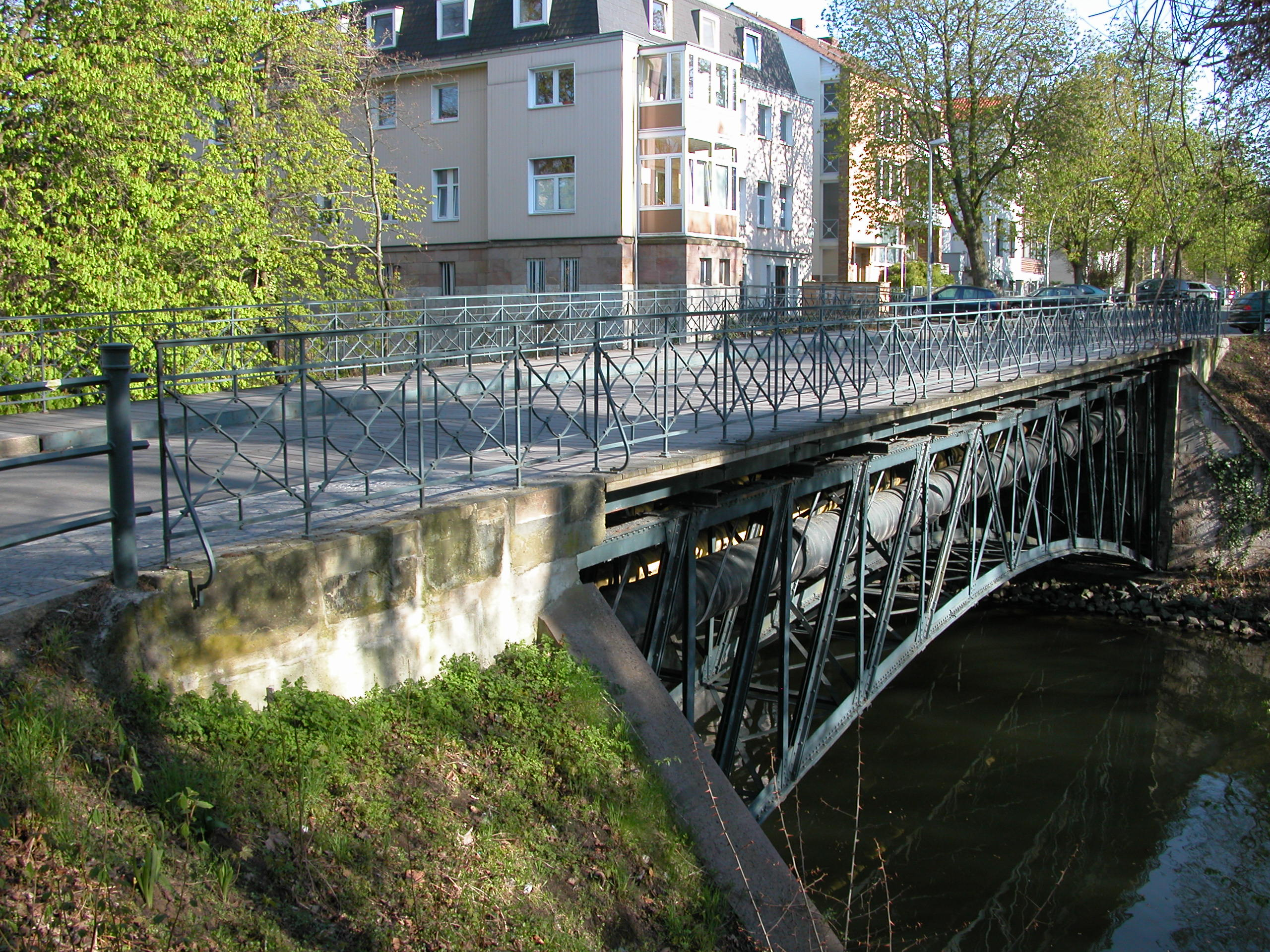 Braunschweig: Brücke Pockelsstraße (von Süden gesehen).